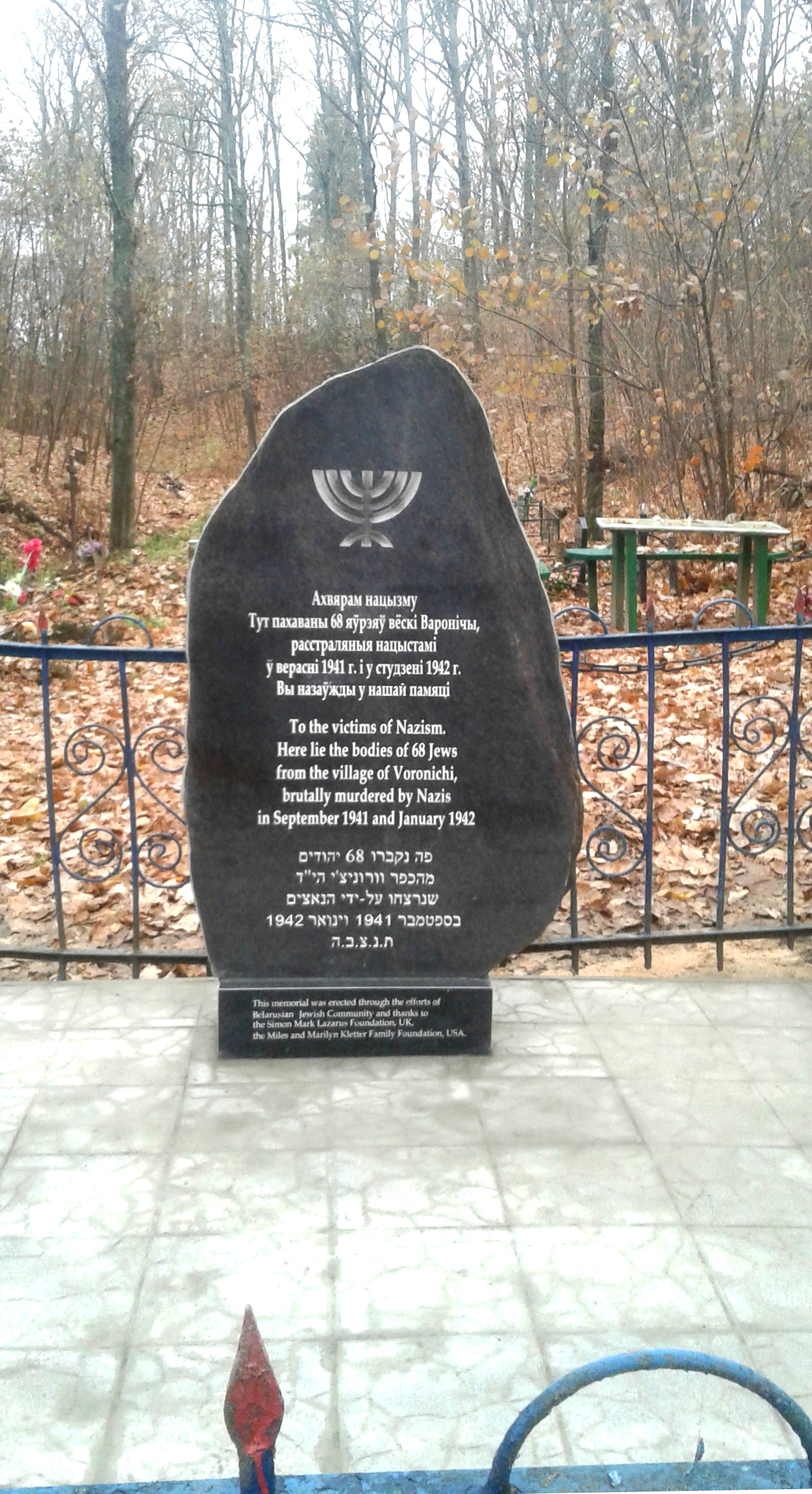 Новый памятник евреям - узникам гетто в деревне Вороничи Полоцкого района, убитым во время Холокоста. Установлен в 2017 году.